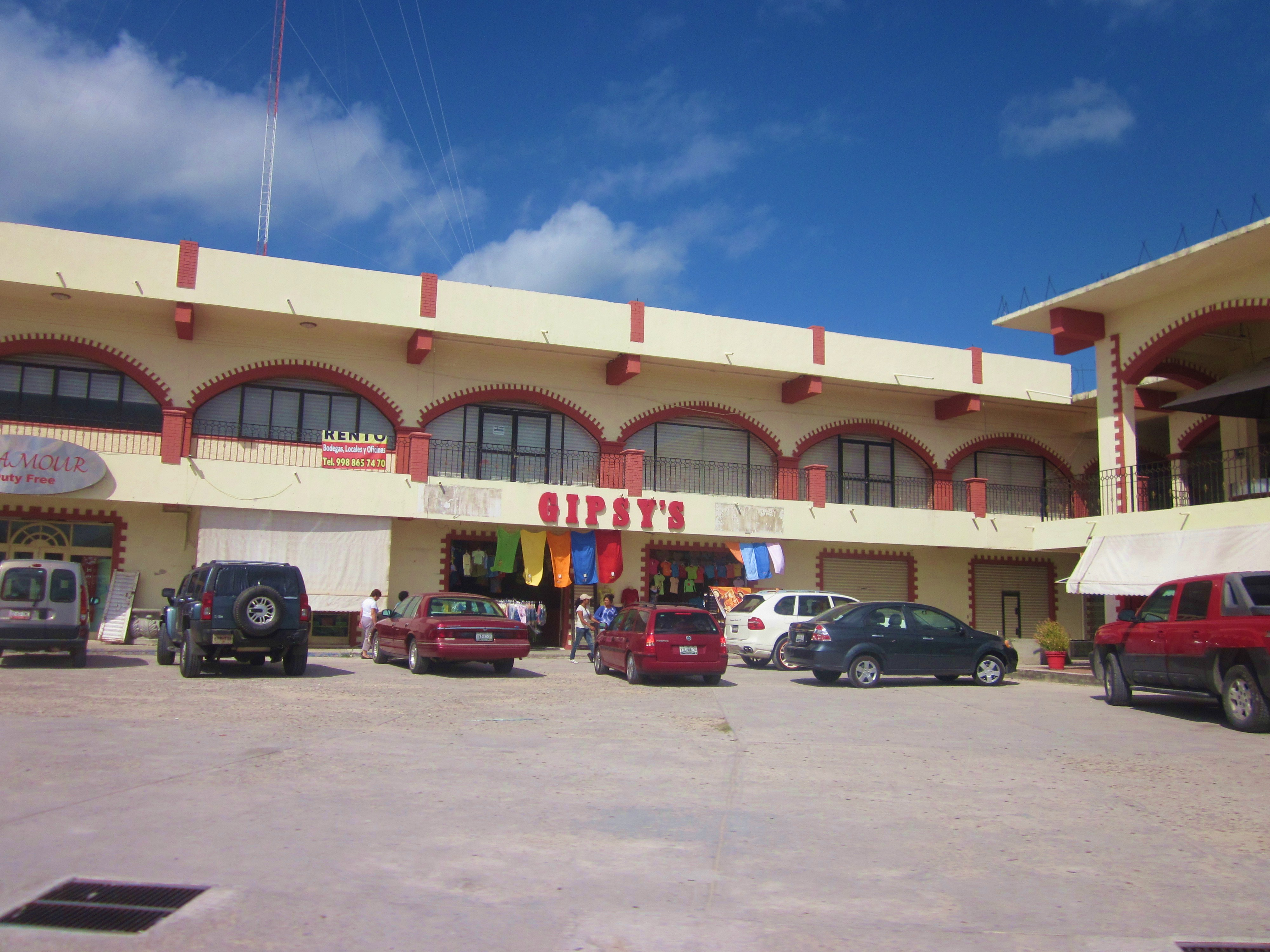 Miniplaza comercial en la Zona Libre.